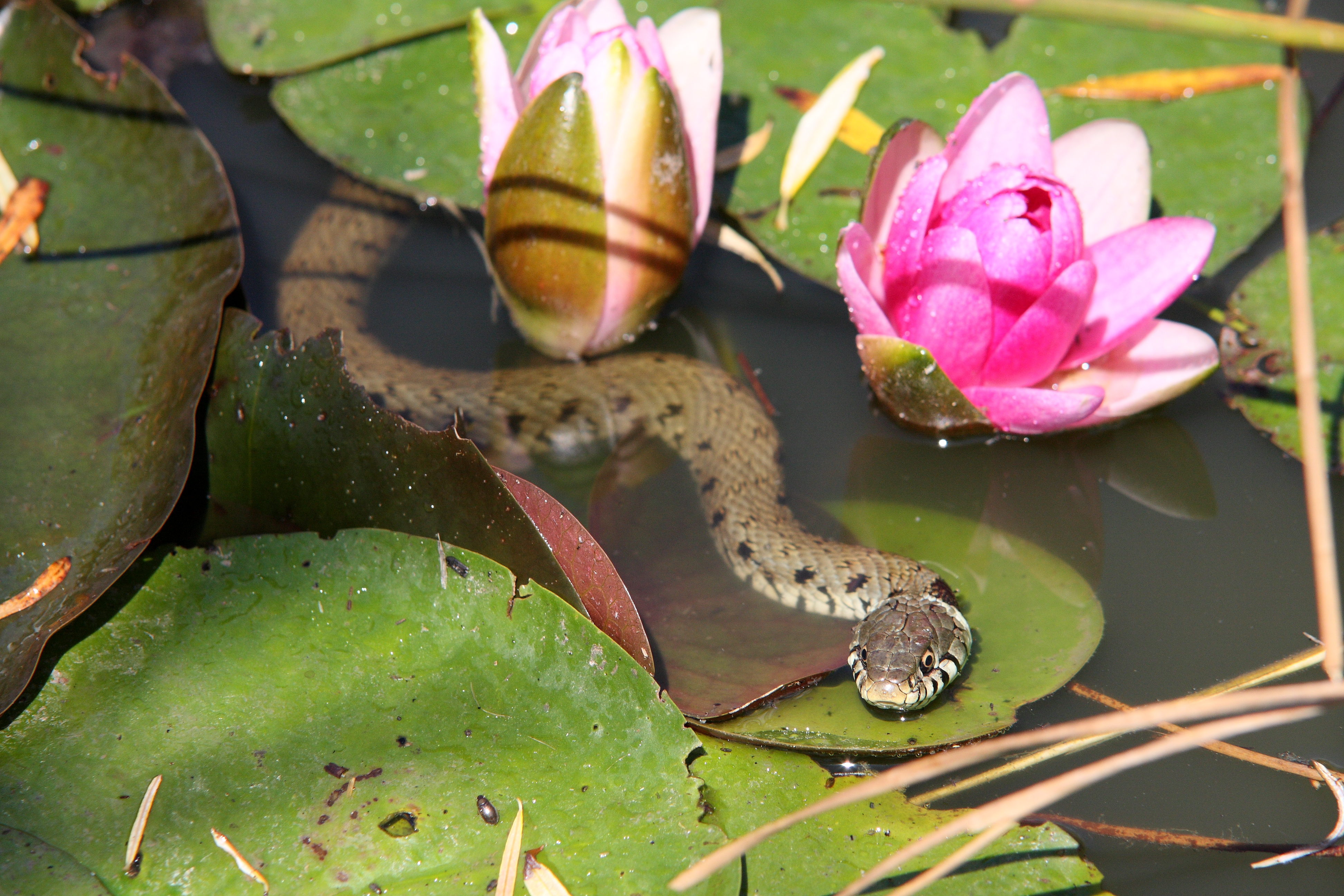 Jeune couleuvre à collier Natrix natrix prenant le soleil entre les nénuphars de la mare.